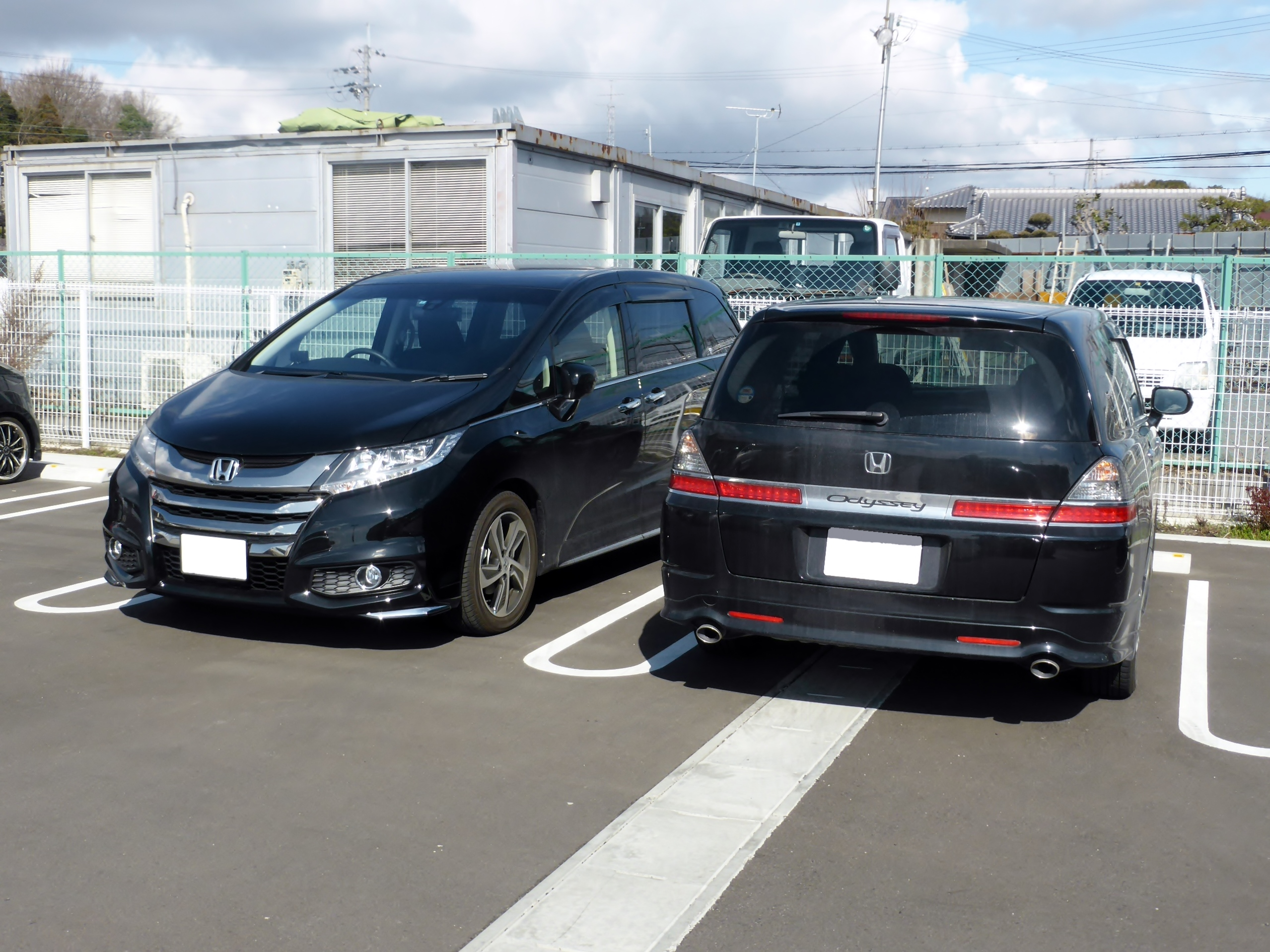 ホンダ・オデッセイのRB1型及びRC1型を撮影。